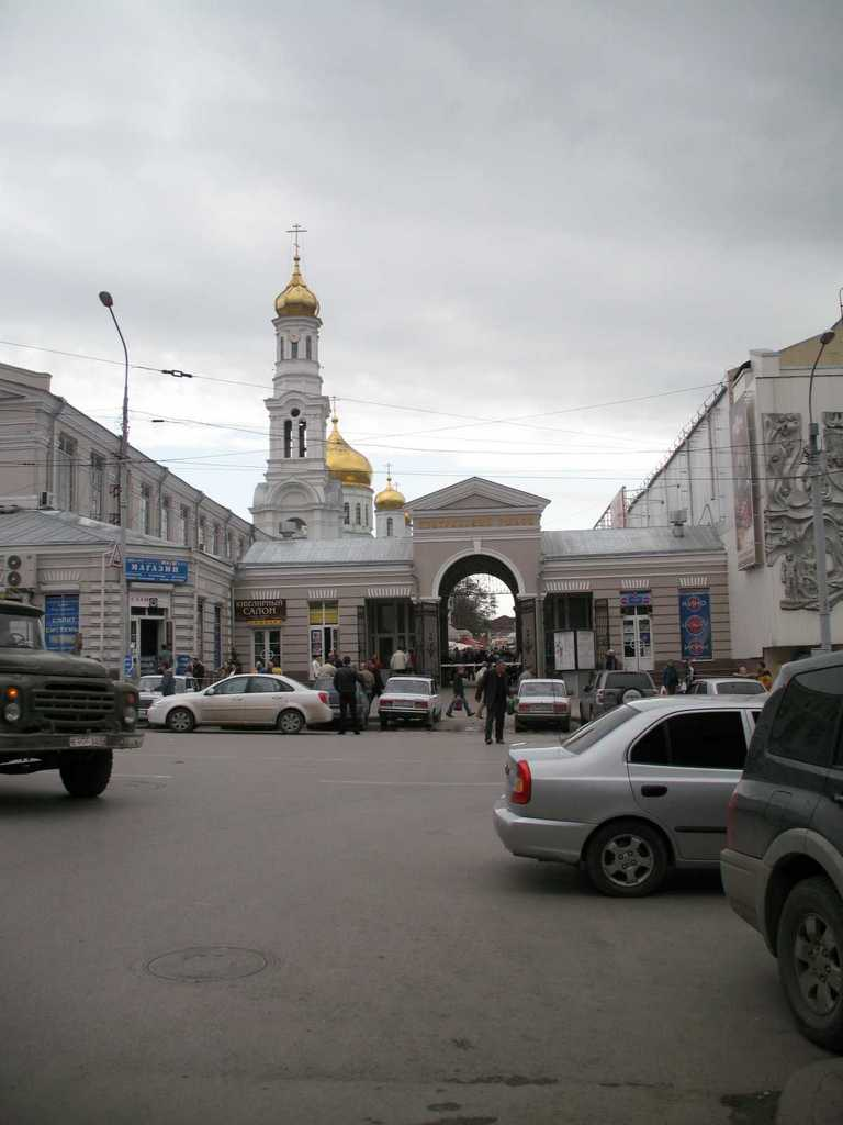 Вход в Центральный рынок Ростова